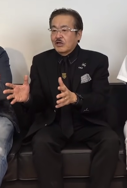 元プロ野球選手・高木豊のYouTubeチャンネルにゲスト出演する岩井良明